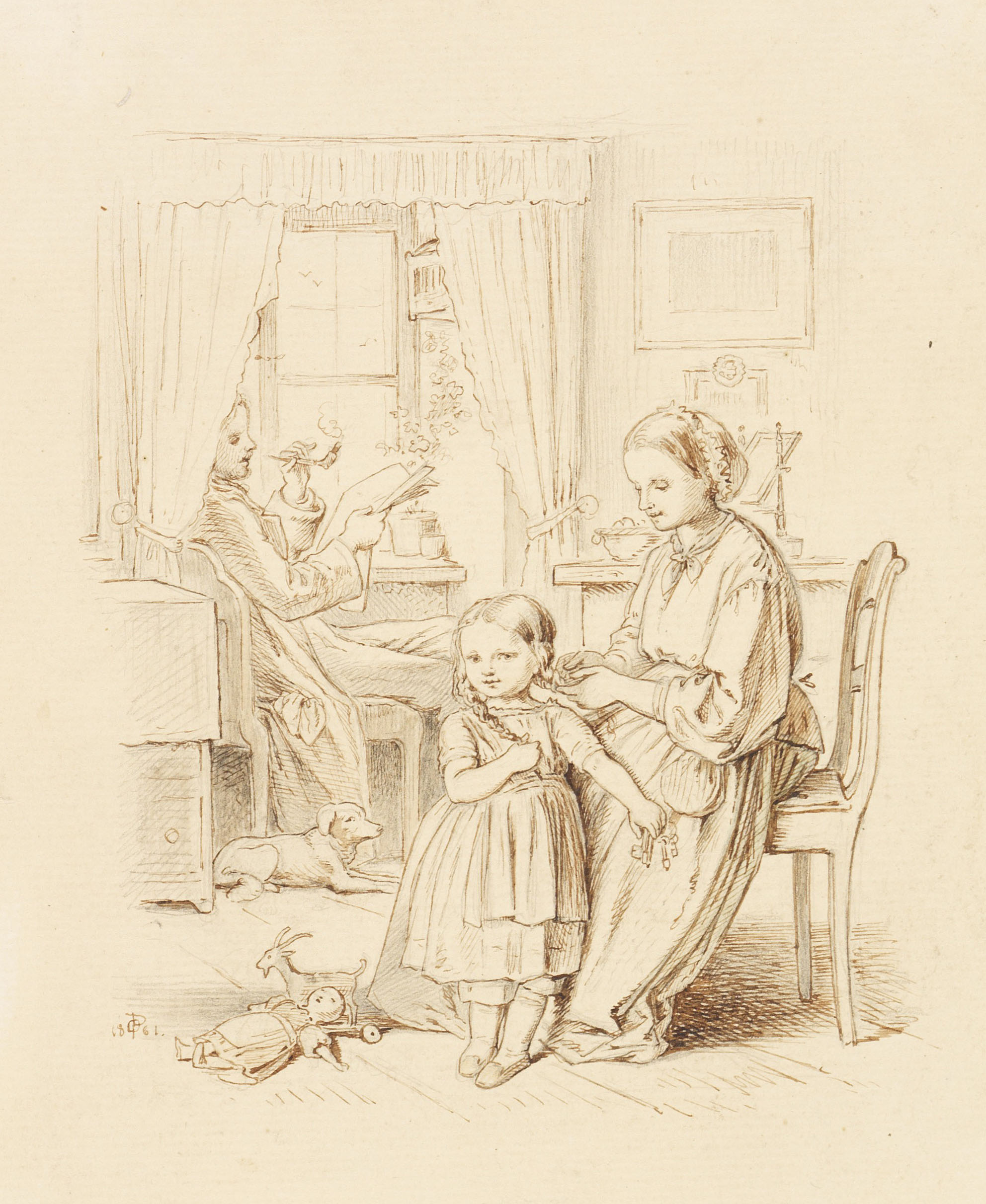 "Und nun trägst du schon Zöpfchen!" 1861. Federzeichnung in Braun über Bleistift. 16,2 x 13,1 cm. Vorlage für eine der 25 Tafeln des Kinderbuches "Wie's im Hause geht - Nach dem Alphabet" (erschienen 1862)